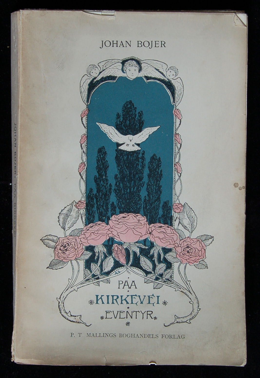 Omslaget til Johan Bojers bok "Paa Kirkevei. Eventyr". Omslagsillustrasjonen er av Thorolf Holmboe. Påskrift: Dr. Henrik Ibsen / I ærbödighed / fra / Johan Bojer